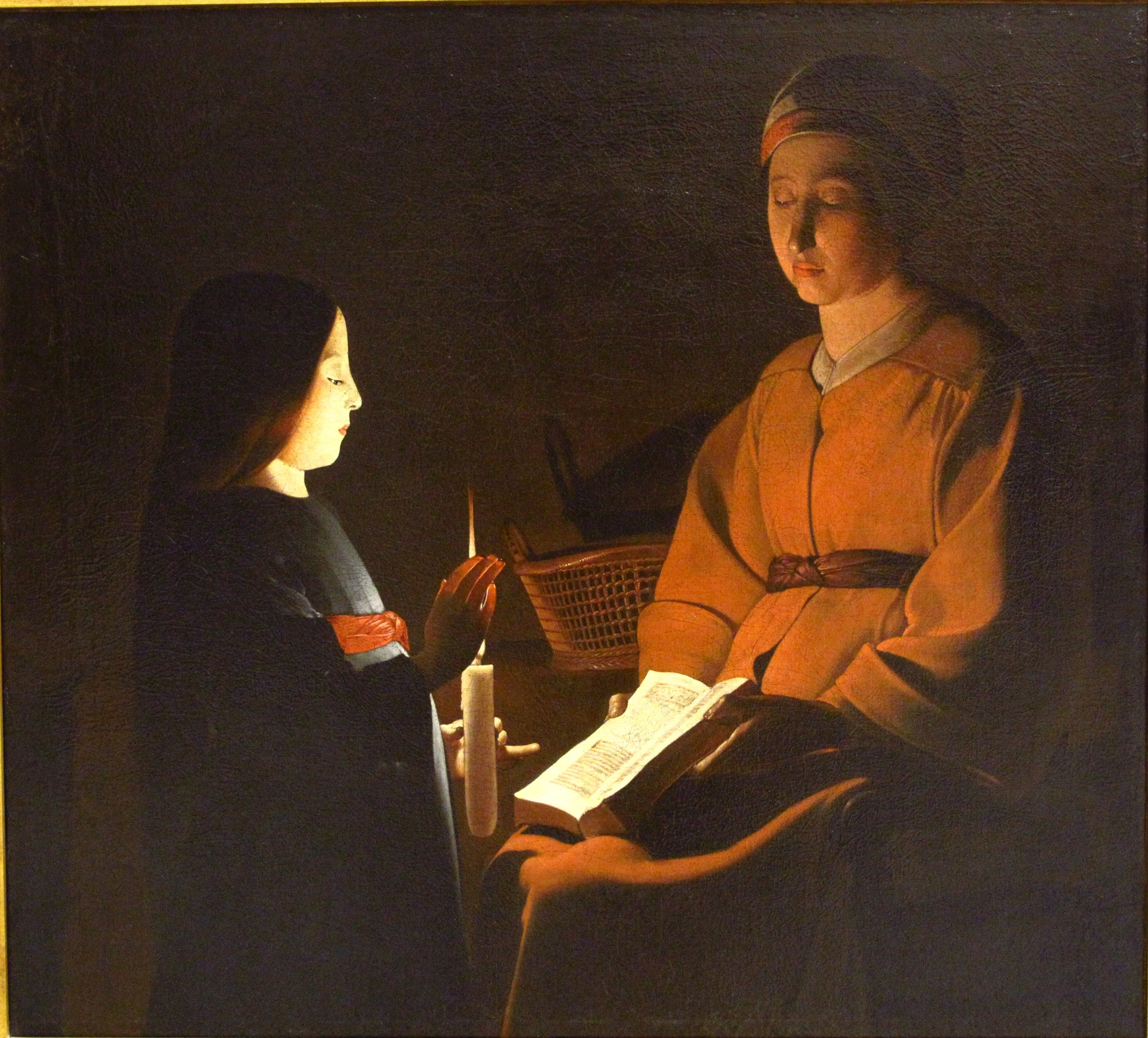 Il existe trois autres versions de cette composition peinte vers 1646 - 1648.